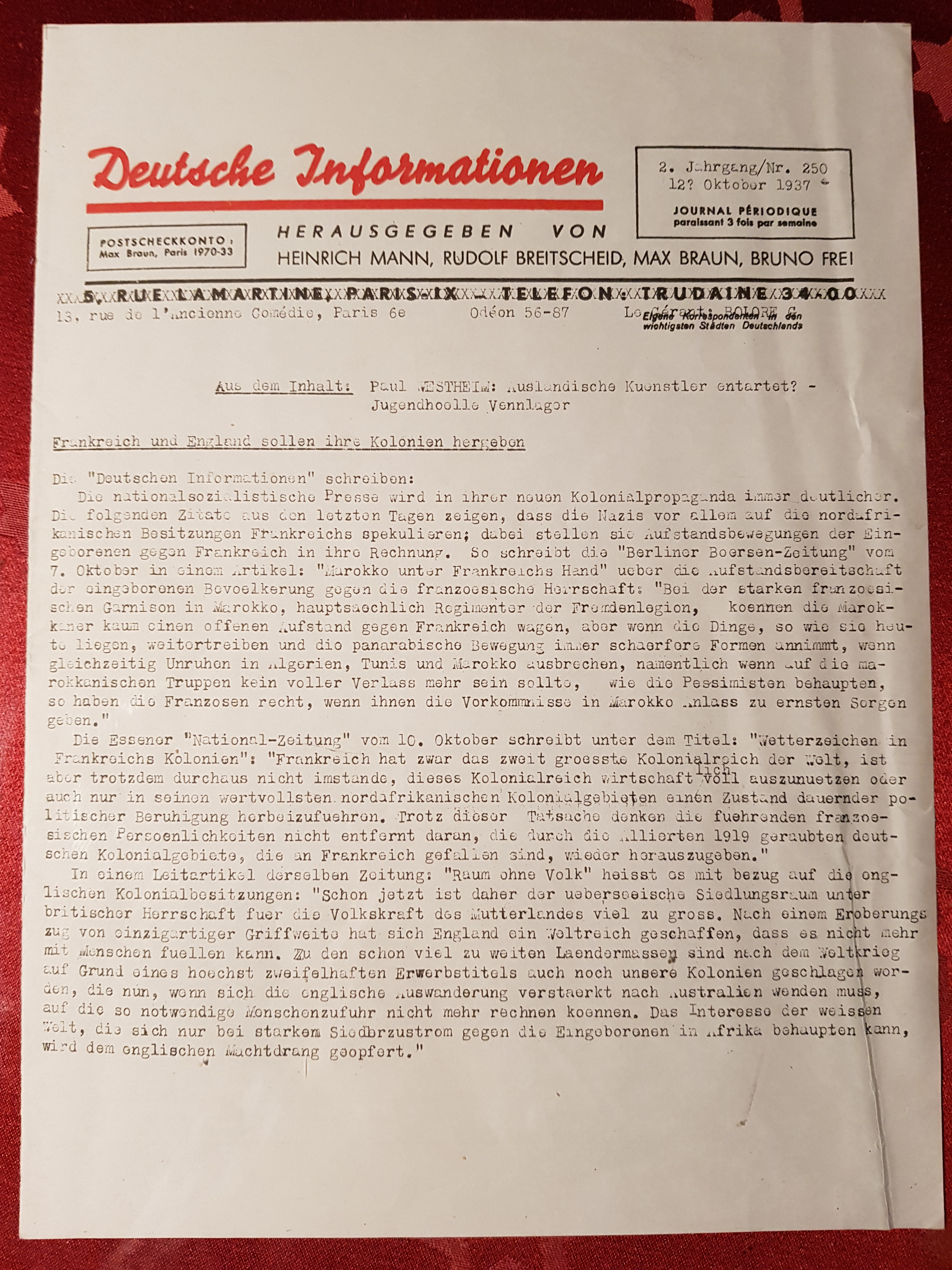 Es handelt sich um die Seite 1 der Exil-Zeitung von Heinrich Mann und anderen aus Paris.